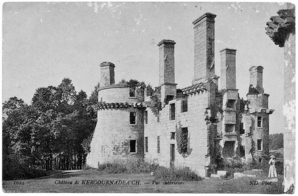 Le château de Kergournadec'h vers 1900 (carte postale ND photo Neurdein)